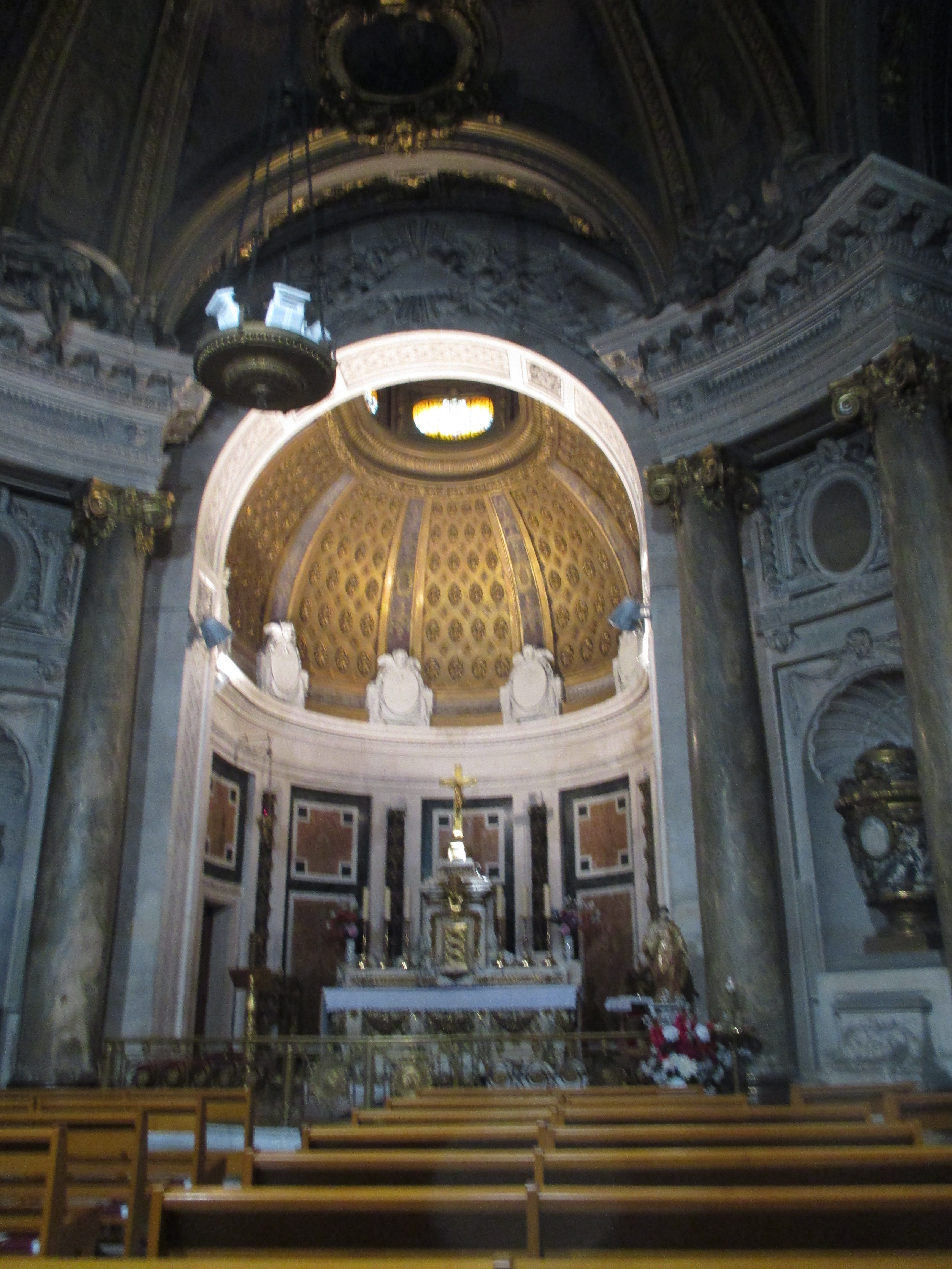 Intérieur de la chapelle Notre-Dame-de-Consolation (Paris VIIIe)